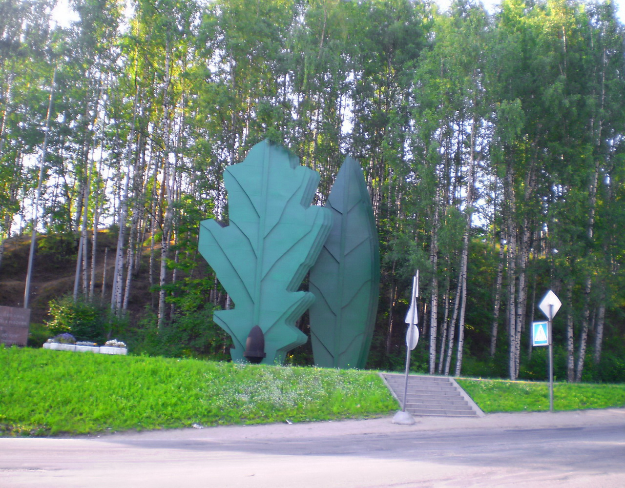 Памятник зенитчикам на Дороге жизни.